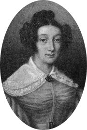 Ilustraciones libro de Memorias Saint-Saëns, 1919